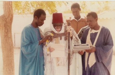 Serigne Abass fait le Sermon